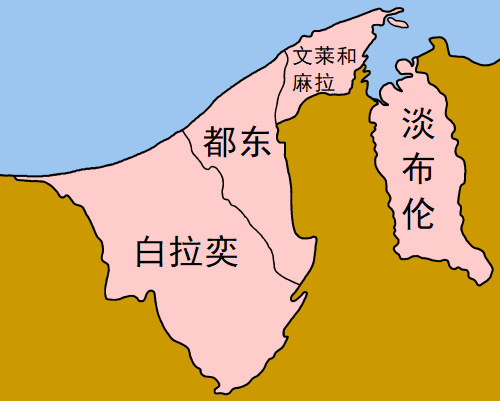 文莱行政区划地图。原作者为User:Golbez。